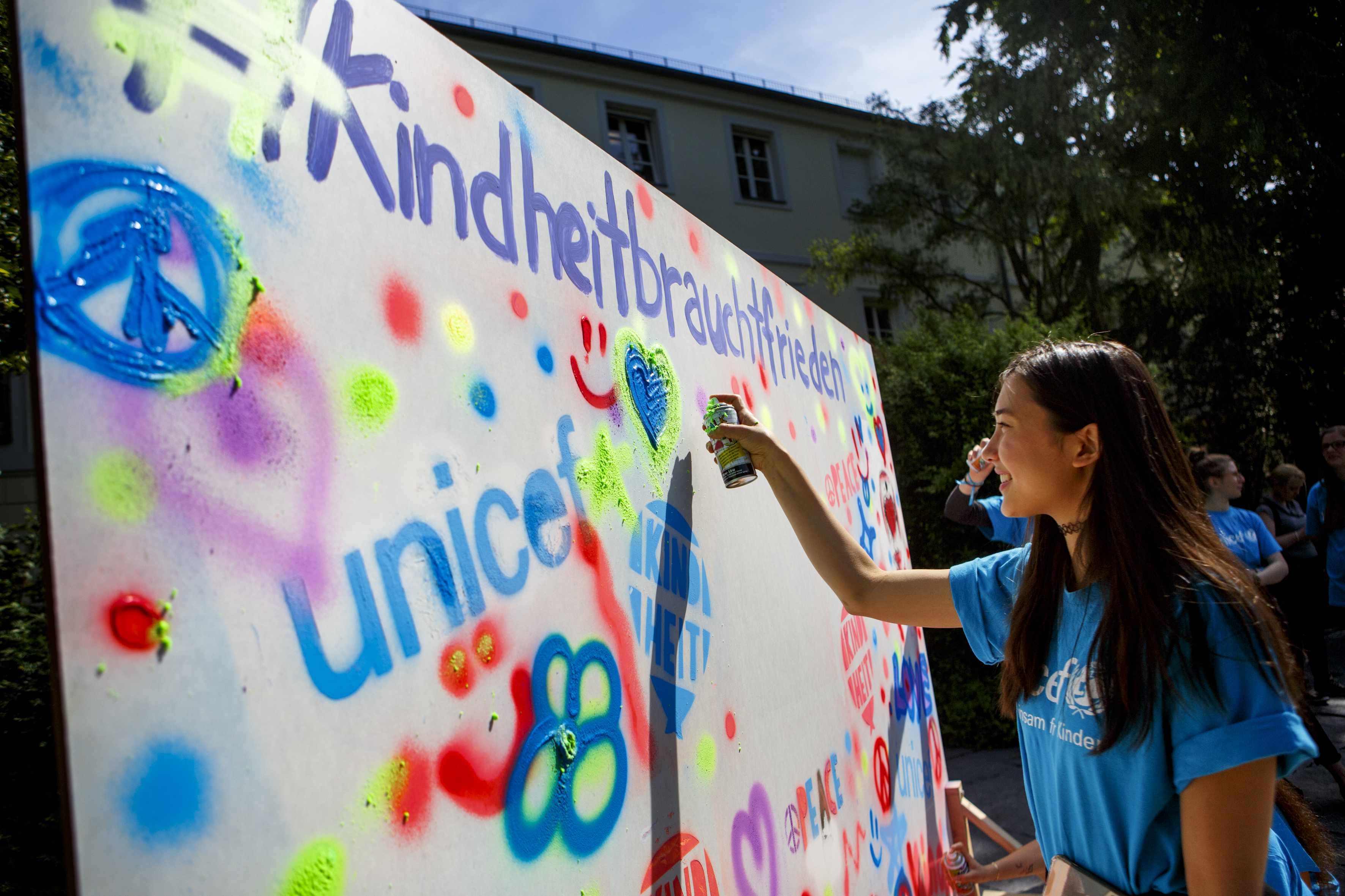 „Kindheit braucht Frieden“: UNICEF JuniorTeam in Schloss Bellevue Neue UNICEF-Schirmherrin Elke Büdenbender trifft engagierte Jugendliche / Übergabe des Ehrenamts durch Daniela Schadt Berlin, 09. Juni 2017 – Elke Büdenbender, Ehefrau des Bundespräsidenten und neue UNICEF-Schirmherrin, setzte heute in Schloss Bellevue ein Zeichen für Frieden und die Unterstützung von Kindern in Krisengebieten. Zusammen mit Jugendlichen des UNICEF JuniorTeams Berlin beteiligte sie sich an der Aktion „Spray for Peace“ und sprühte mit Kreide Friedenssymbole auf eine Wand im Schlossgarten. Damit unterstützt sie die bundesweite UNICEF-Kampagne „Kindheit braucht Frieden“. Mit der Kampagne setzt sich UNICEF für das Recht von Kindern im Krieg und auf der Flucht auf eine sichere, gute Kindheit ein. Elke Büdenbender wurde begleitet von der bisherigen Schirmherrin Daniela Schadt, die das traditionelle Ehrenamt damit offiziell weitergab.